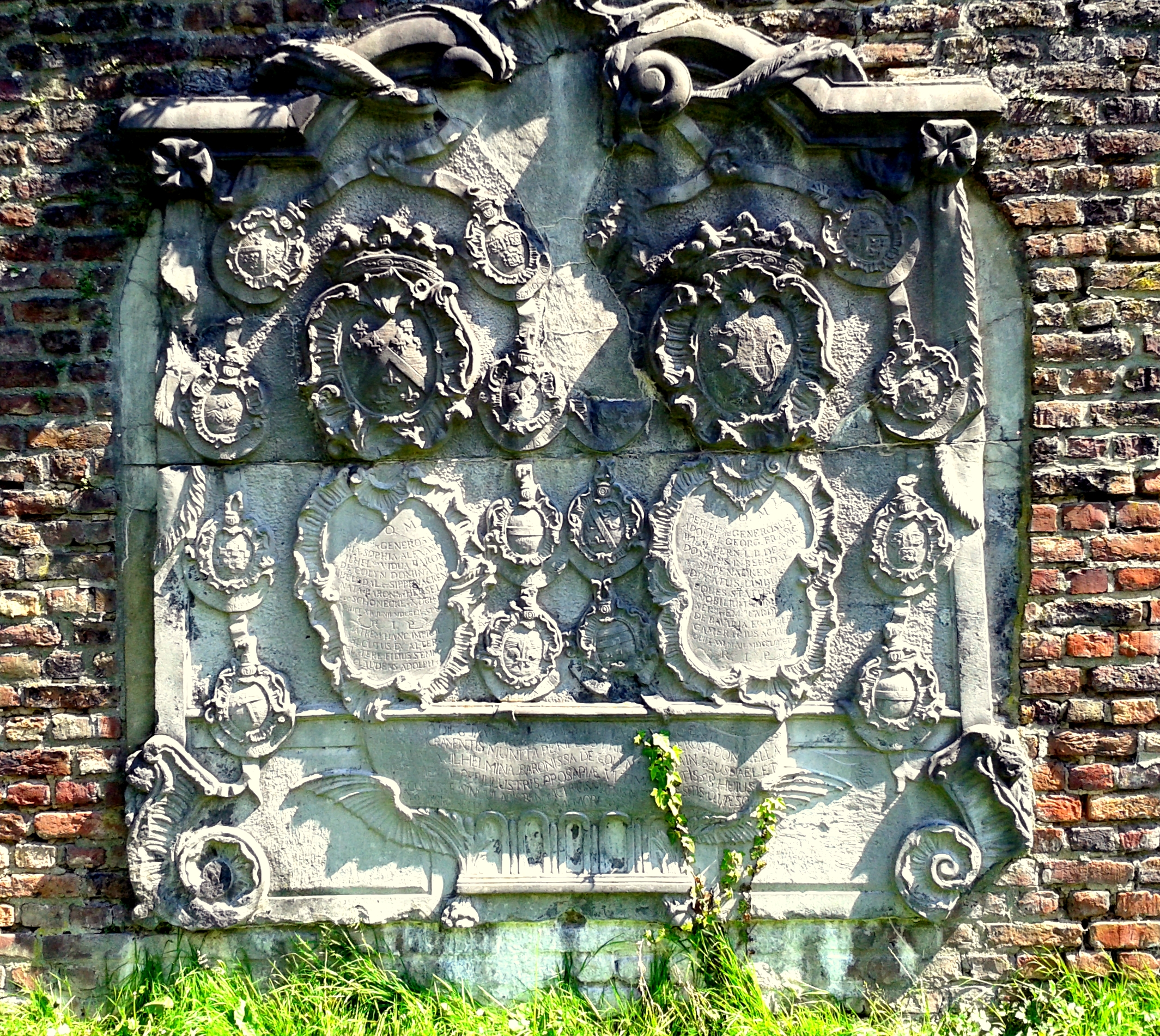 Wappenstein der Familie Adolphus Georgius Franciscus Wilh. De Colyn († 21. Mai 1753) und Ehefrau Maria Sophia Alexandrina Wilhelmina Ab Herssel († 14. Juni 1752), im Kurpark Aachen-Burtscheid